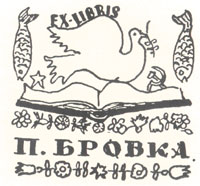 Мікола Тарасікаў. Экслібрыс.